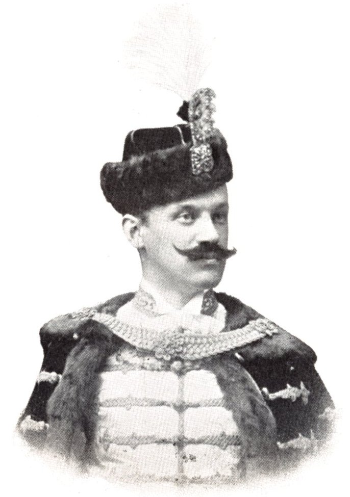 Jankovich Marcell (1874-1949) politikus, ügyvéd, alpinista